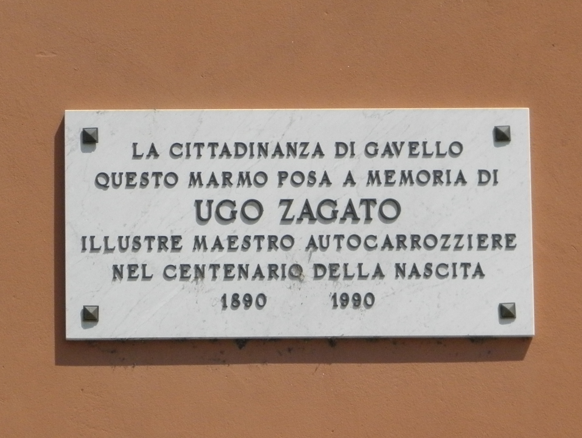 Gavello, Palazzo Grimani: lapide commemorativa dedicata Ugo Zagato murata sulla facciata del municipio.